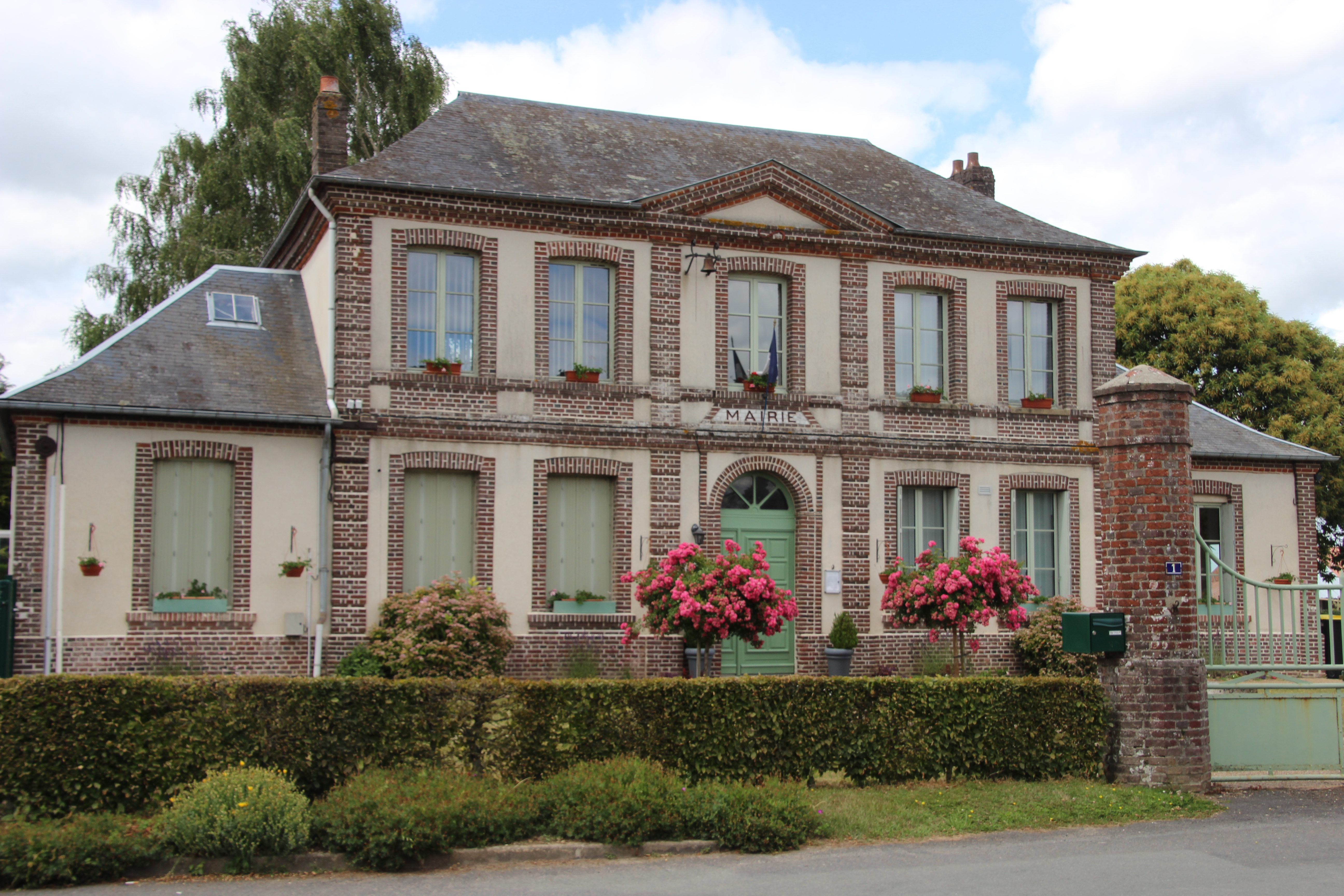 Mairie Saint Aignan sur Ry 2